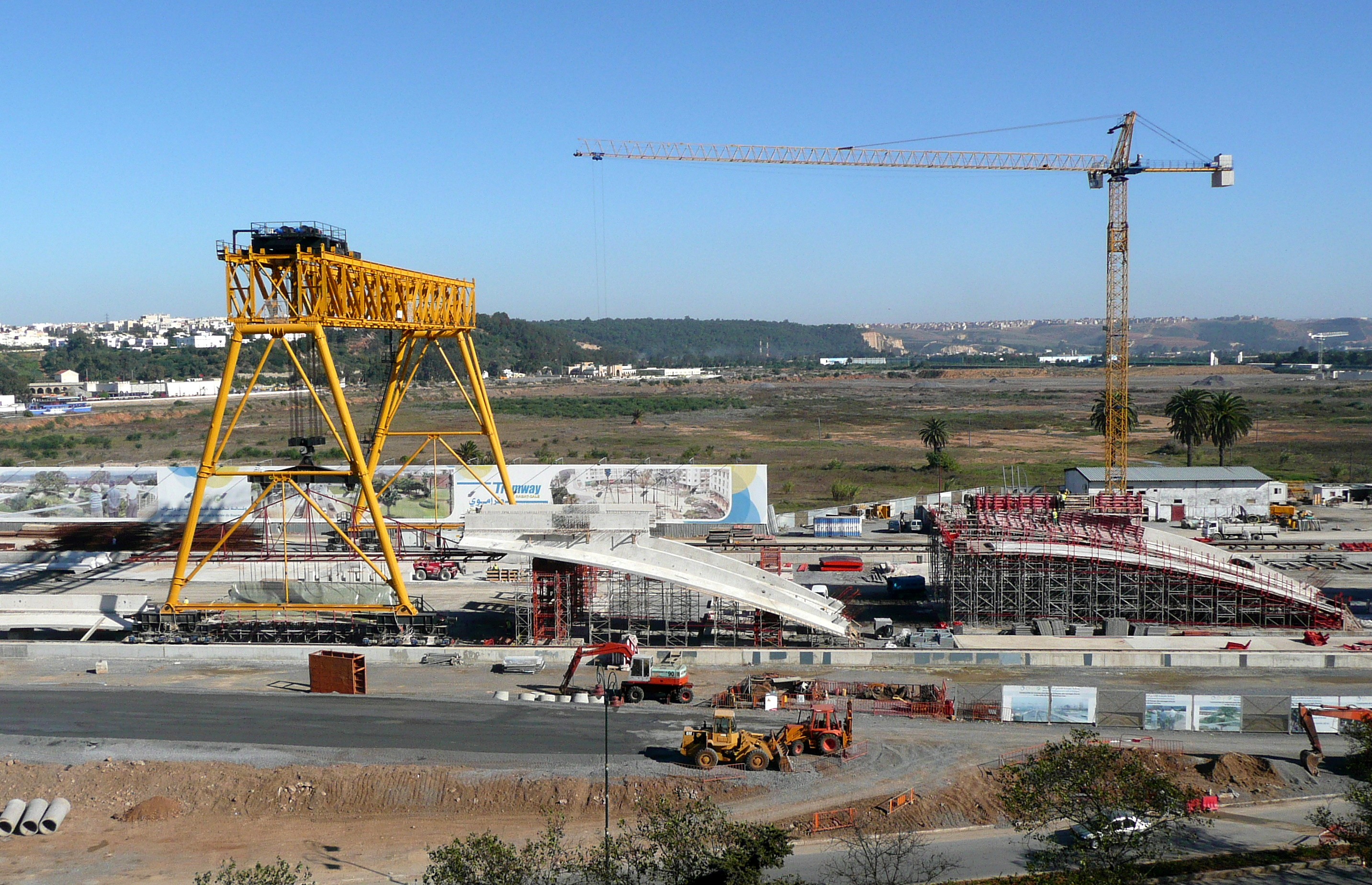 Chantier du nouveau pont entre Rabat et Salé emprunté par le futur tramway (Maroc)